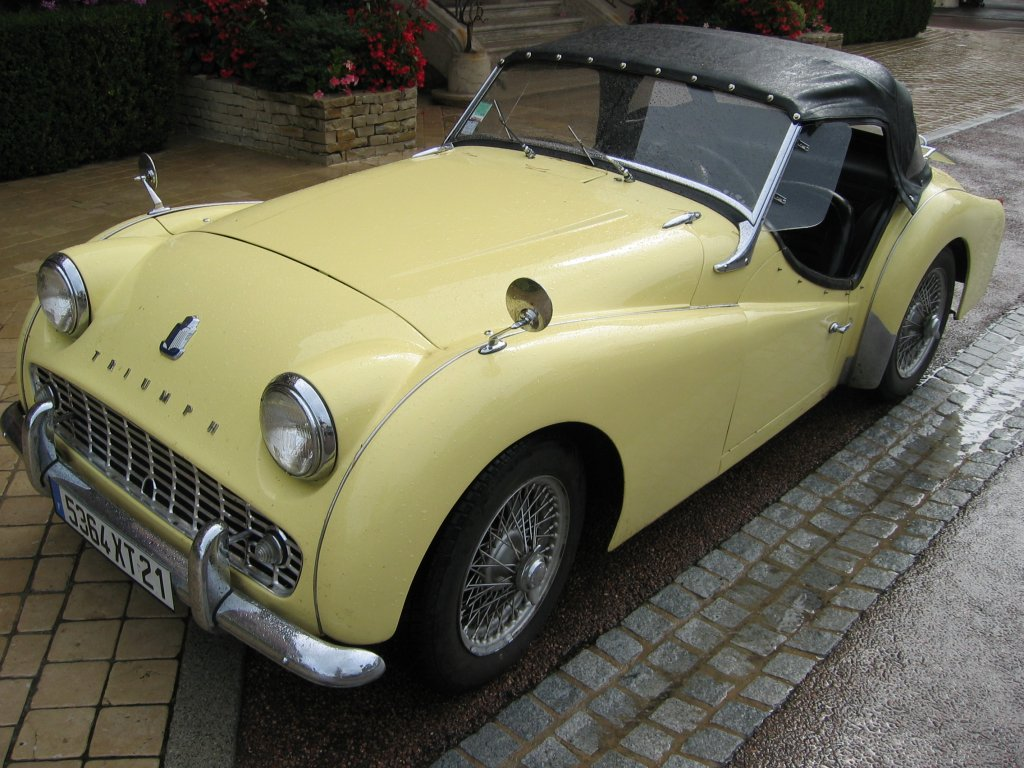 Triumph TR3